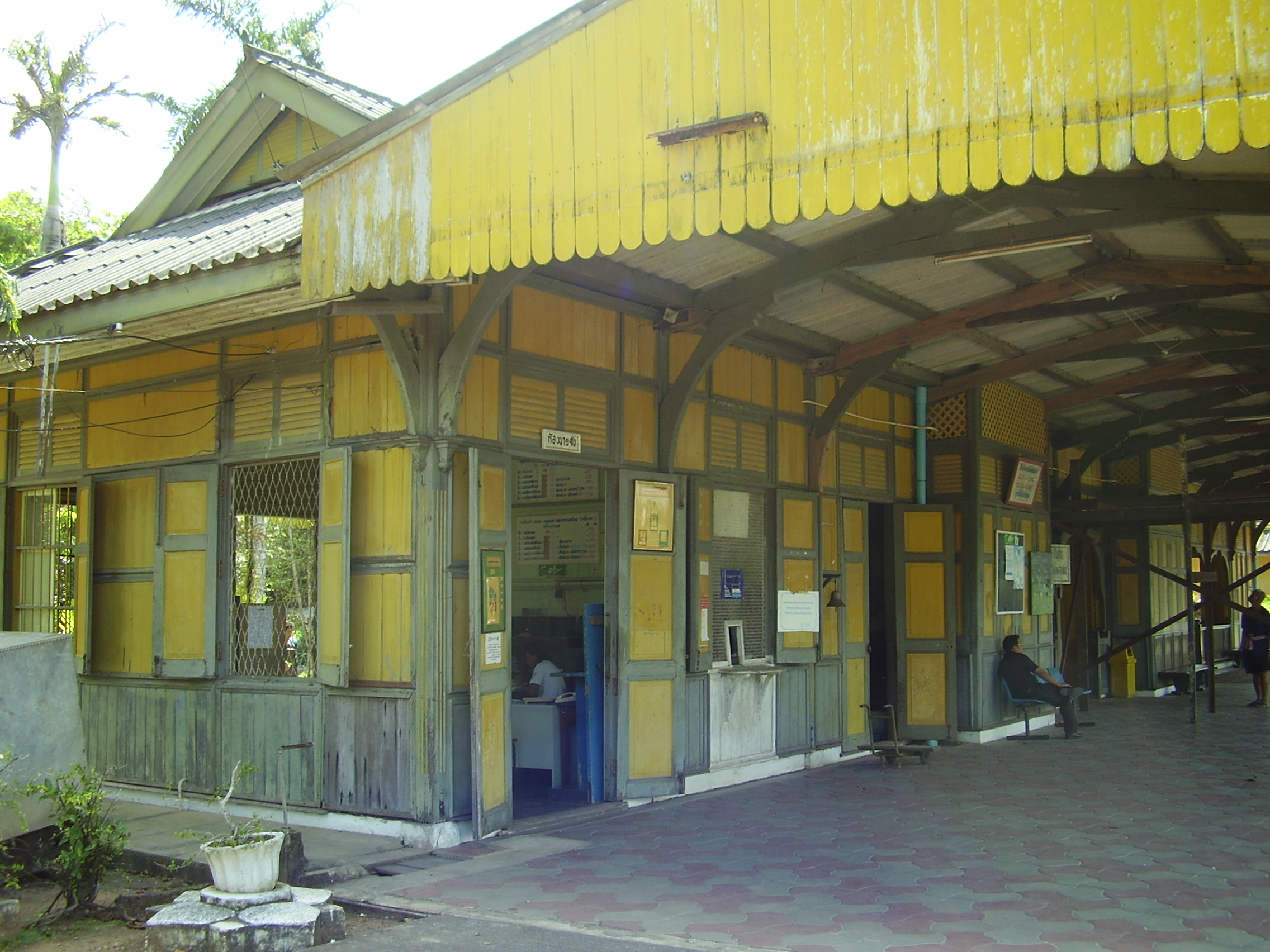 Kantang railway station